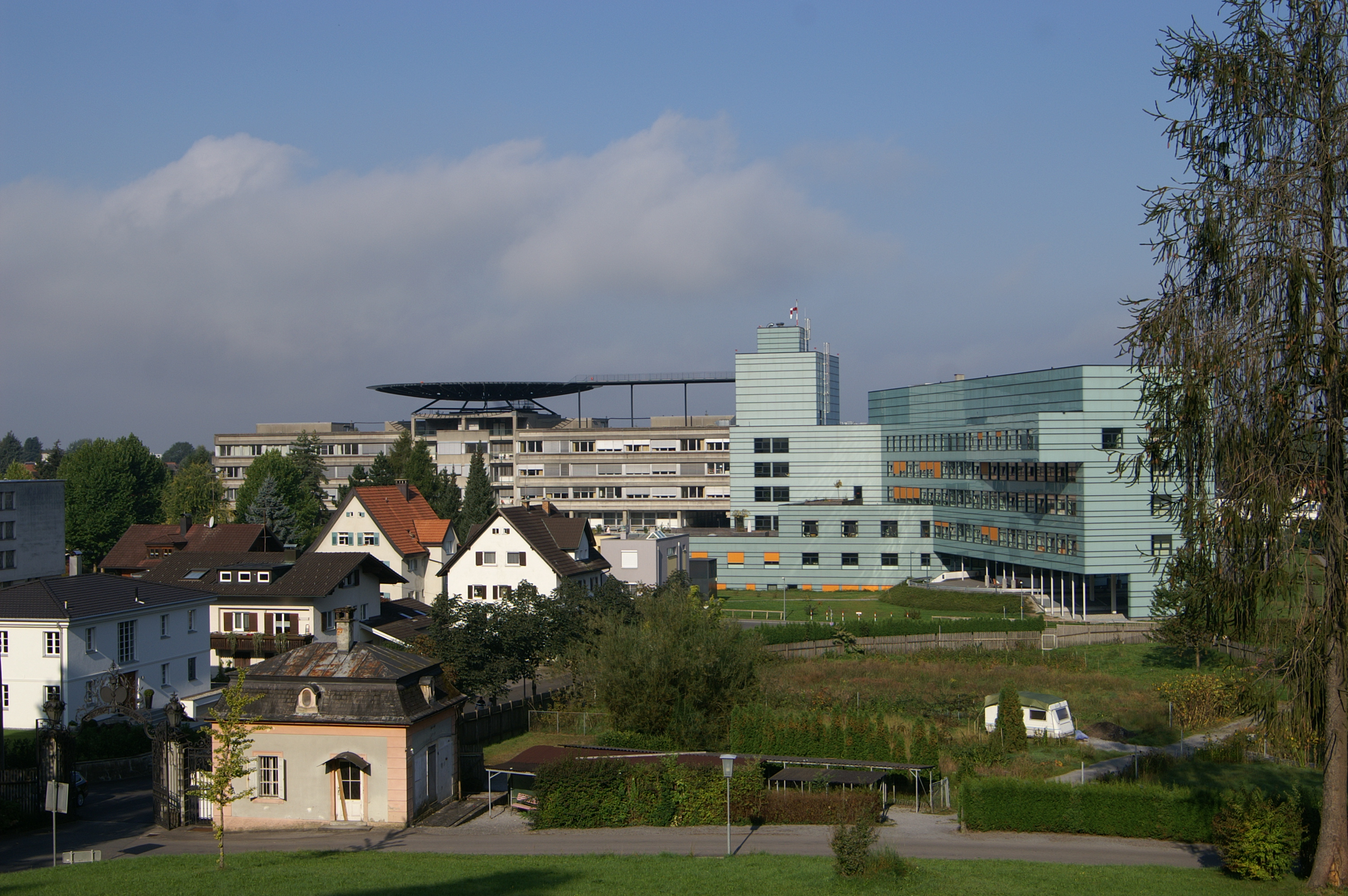 Landeskrankenhaus Bregenz, Arge Architektur Baumschlager & Eberle , Itten&brechbühl ag, Volker Giencke *** Blick vom Kloster Marienberg